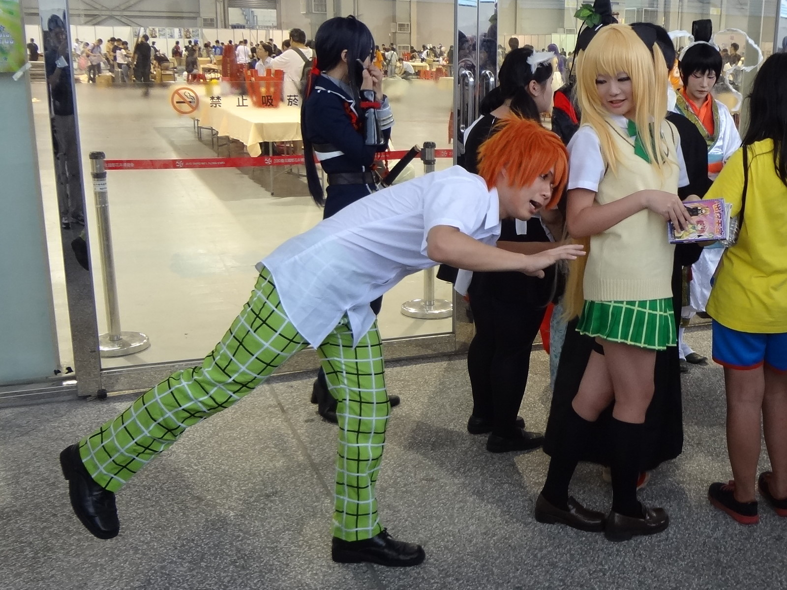 中文（台灣）: 第22屆亞洲動漫創作展，《出包王女Darkness》結城梨斗（左，彩南高中學生服版）、金色闇影（右，彩南高中學生服版）cosplayer。金色闇影cosplayer手上的書是東立出版社《出包王女Darkness》臺灣中文版單行本第1集。